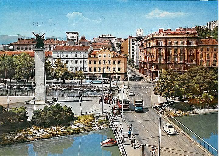 delta, nekad